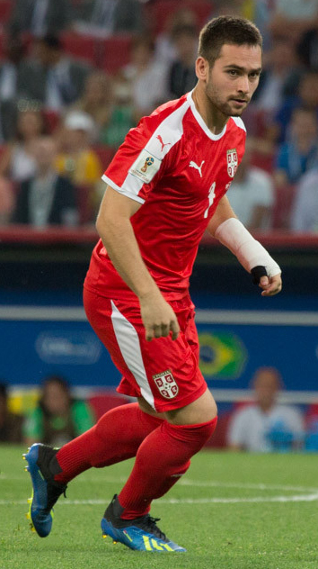 Сборная Бразилии оставляет Сербию за бортом ЧМ-2018 и выходит в плей-офф